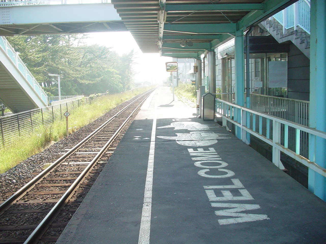 （駅ホーム）